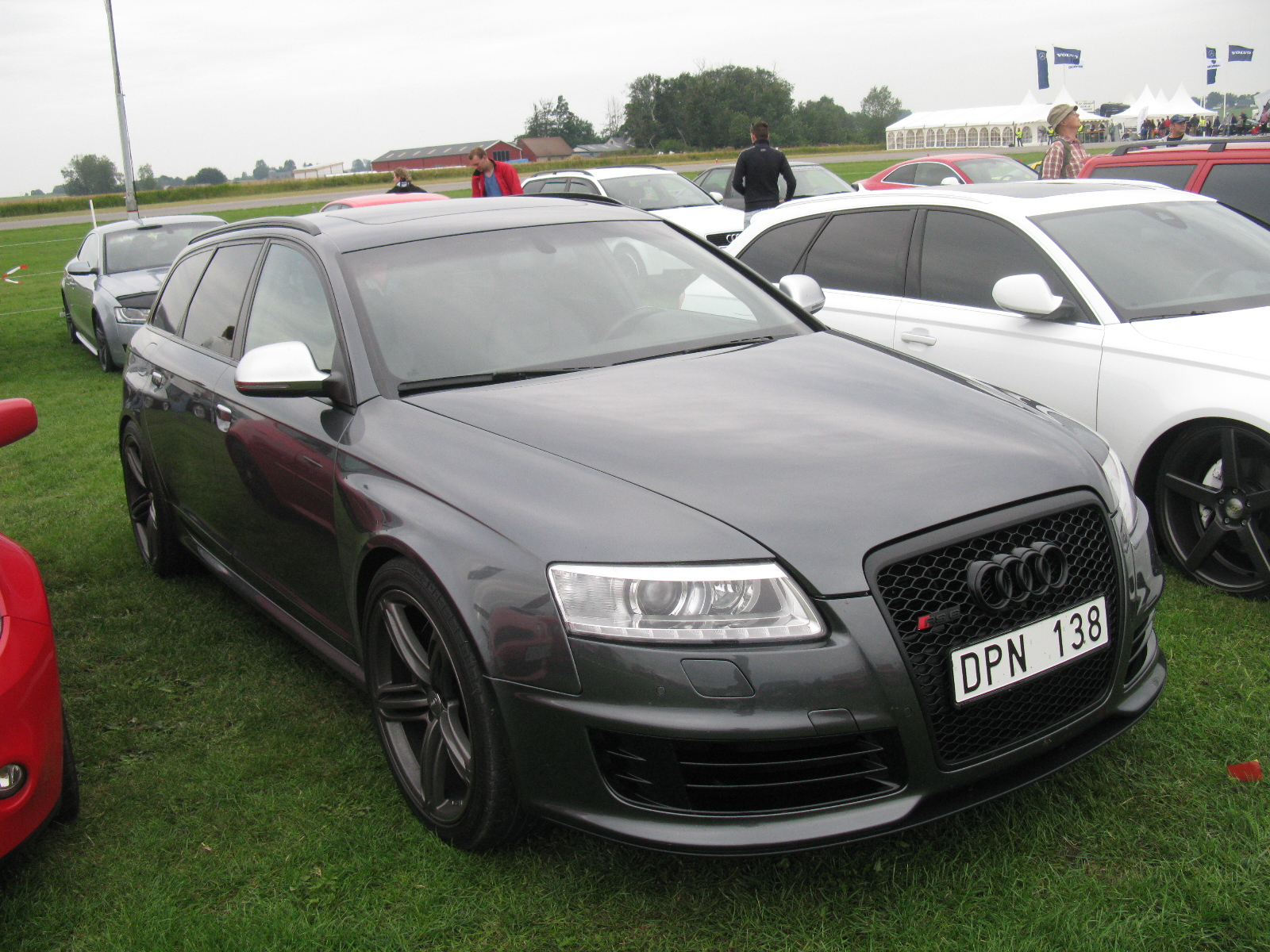 Audi RS6 Avant